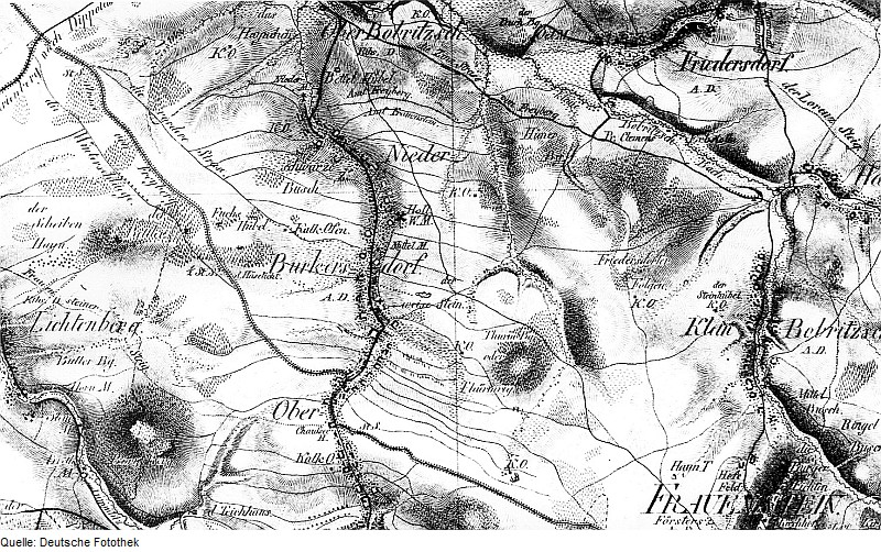 Original image description from the Deutsche Fotothek Frauenstein-Burkersdorf. Oberreit, Sect. Altenberg, 1821